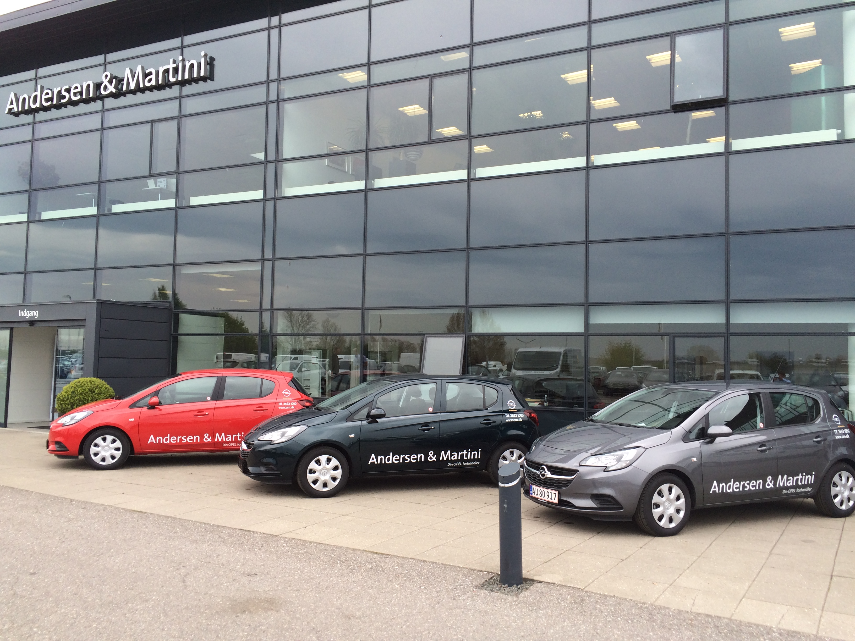 Andersen & Martinis hovedsæde i Greve